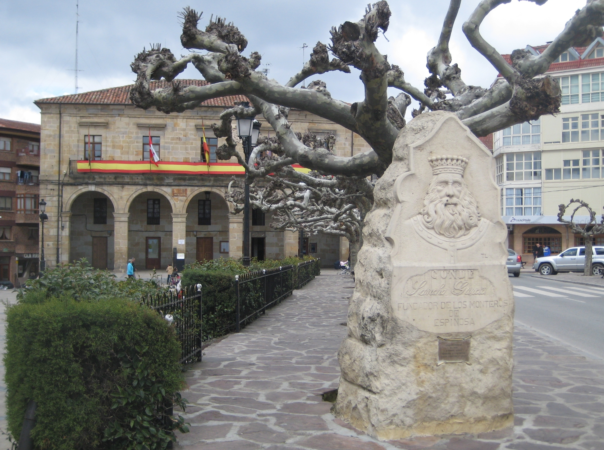 Plaza Sancho García, Espinosa de los Monteros, Merindades, Burgos, España. En primer plano, el monumento a Sancho García (con la inscripción Conde Sancho García. Fundador de los Monteros de Espinosa). Al fondo, el Ayuntamiento.